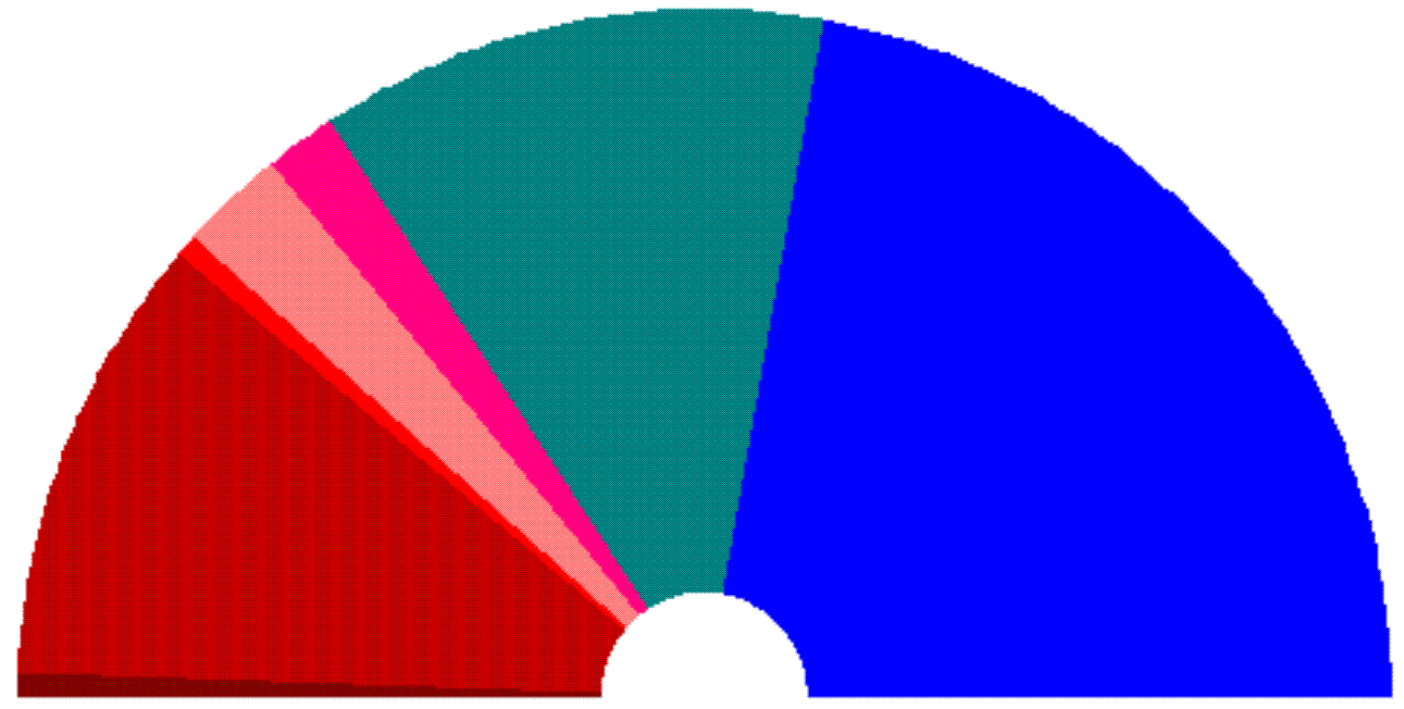 Wähleranteile der französischen Präsidentenwahlen 1969 (1. Wahlgang)